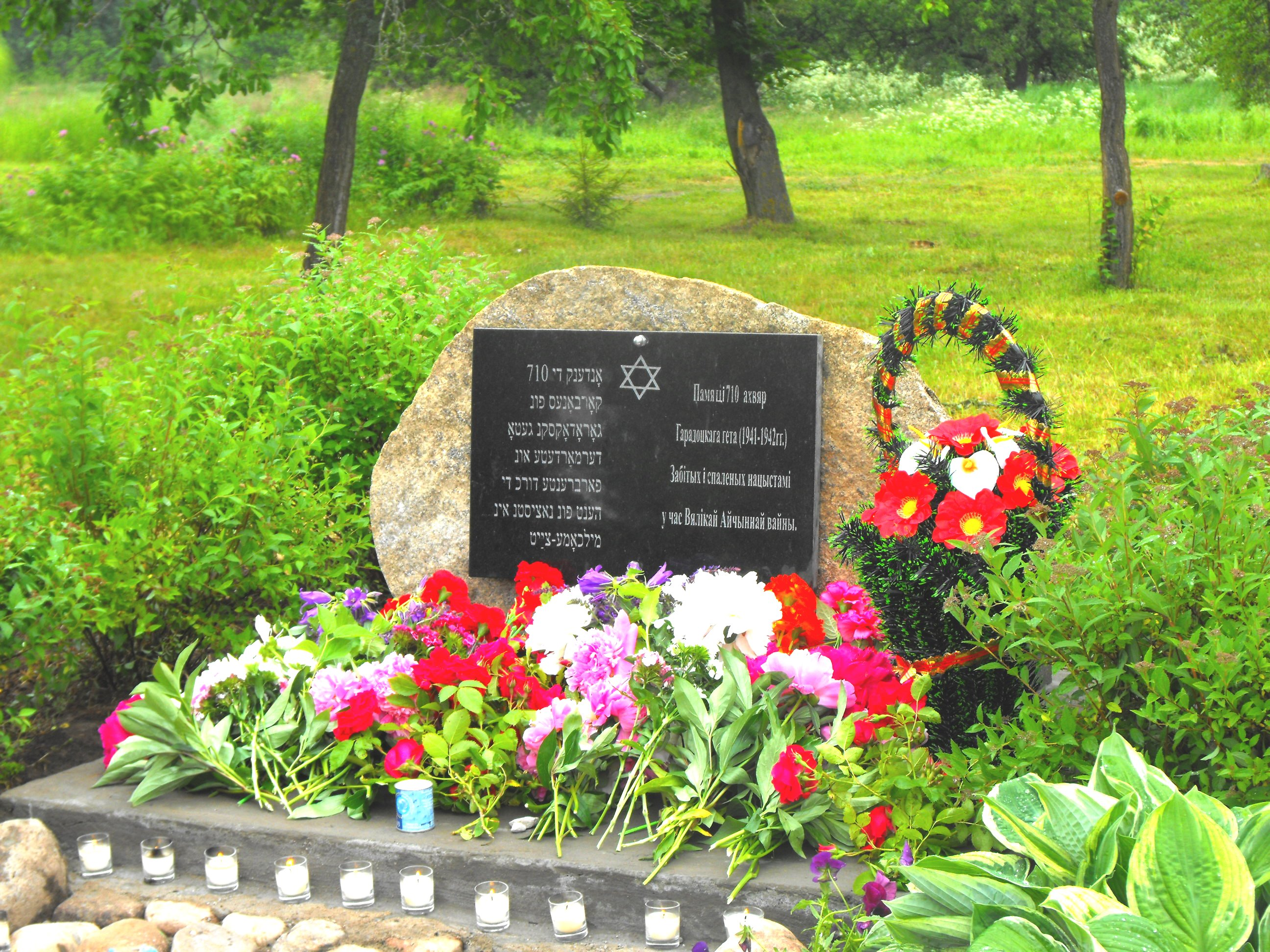 Памятник убитым нацистами евреям деревни Городок Молодечненского района Минской области на месте бывшего гетто. Открыт 20 июня 2015 года.